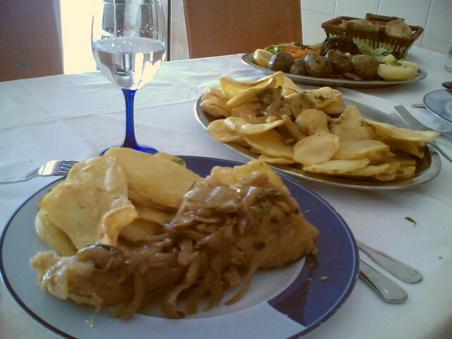 Bacalhau à minhota, a portuguese dish